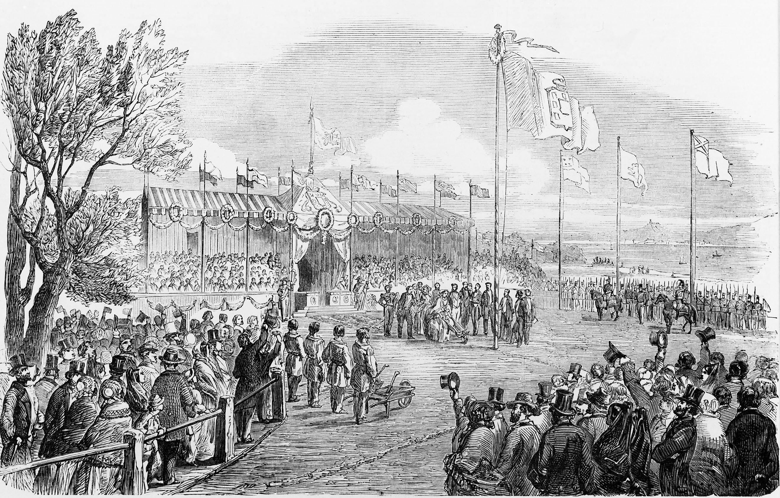 Cerimónia de inauguração da obra dos Caminhos de Ferro de Lisboa. Lisboa 7 de Maio de 1853